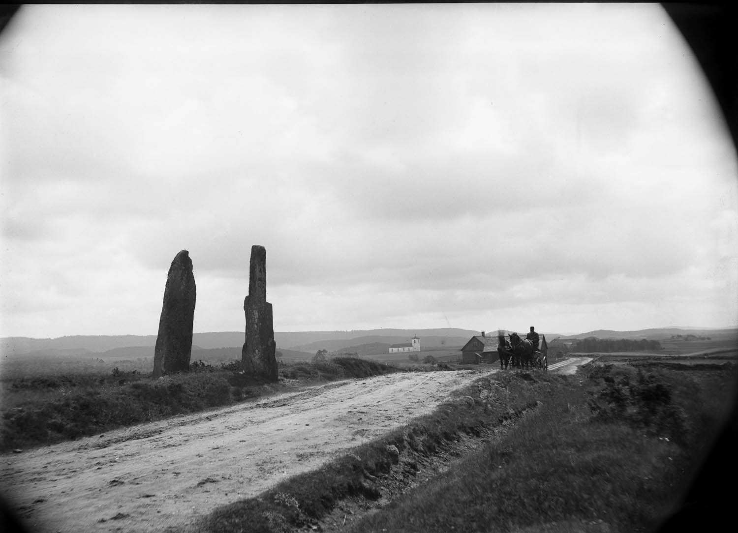 Depicted place: Halland, Årstads hd, Asige (Sverige (SE))